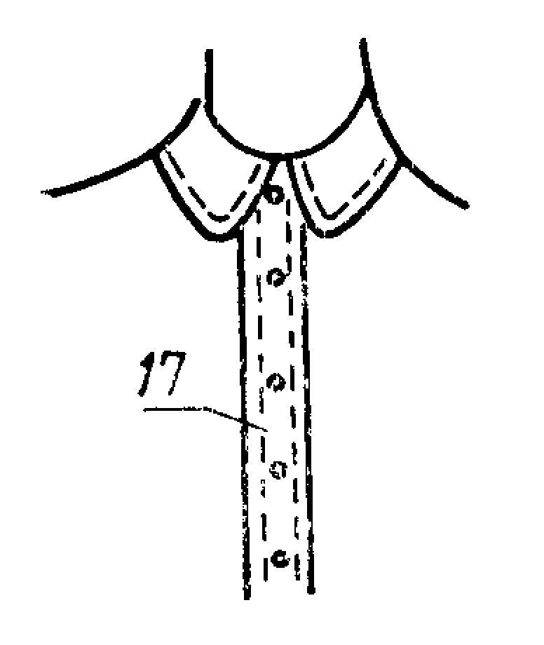 Изображение из ГОСТ 22977-89 (СТ СЭВ 6484-88) — Детали швейных изделий. Термины и определения.